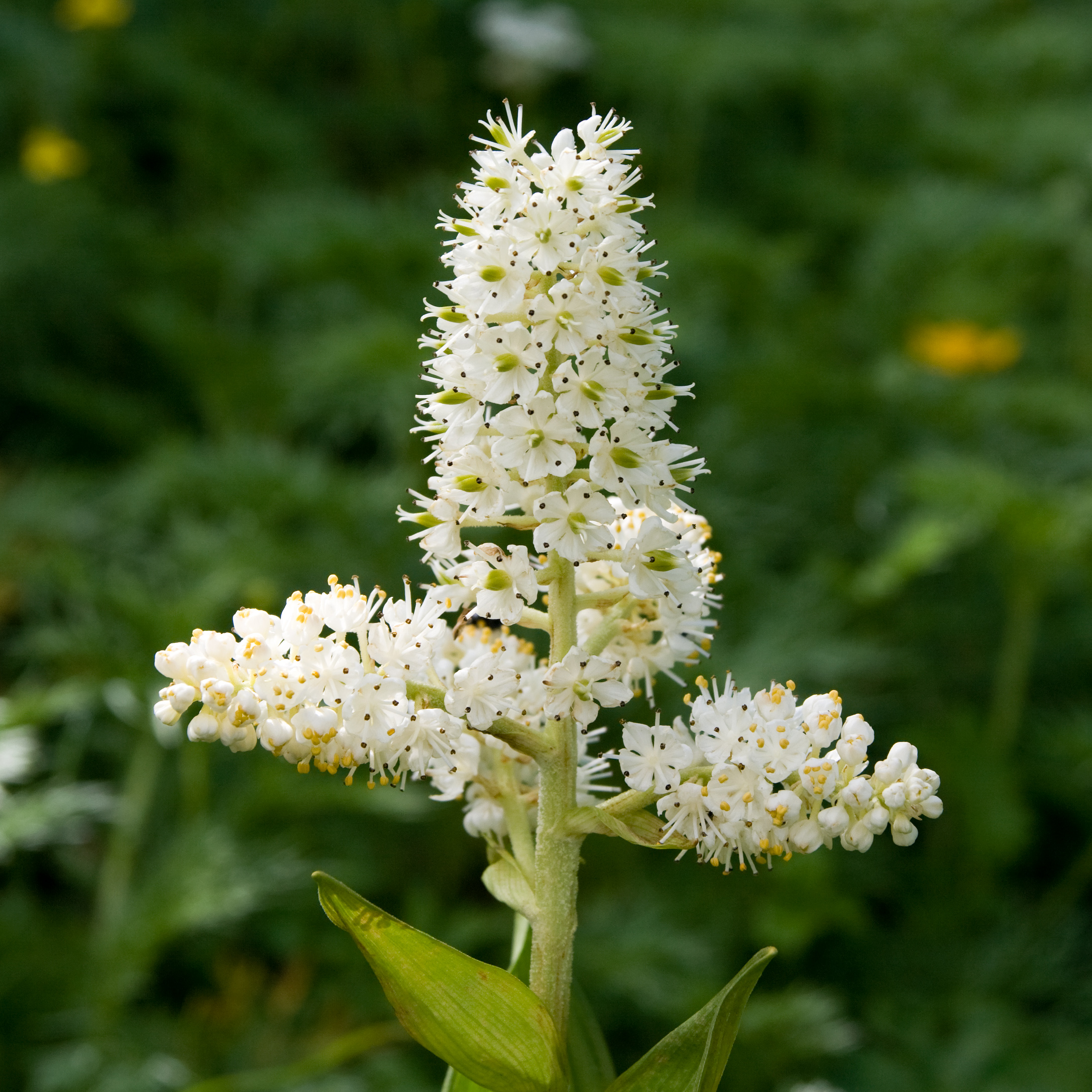 コバイケイソウ (学名:Veratrum stamineum)